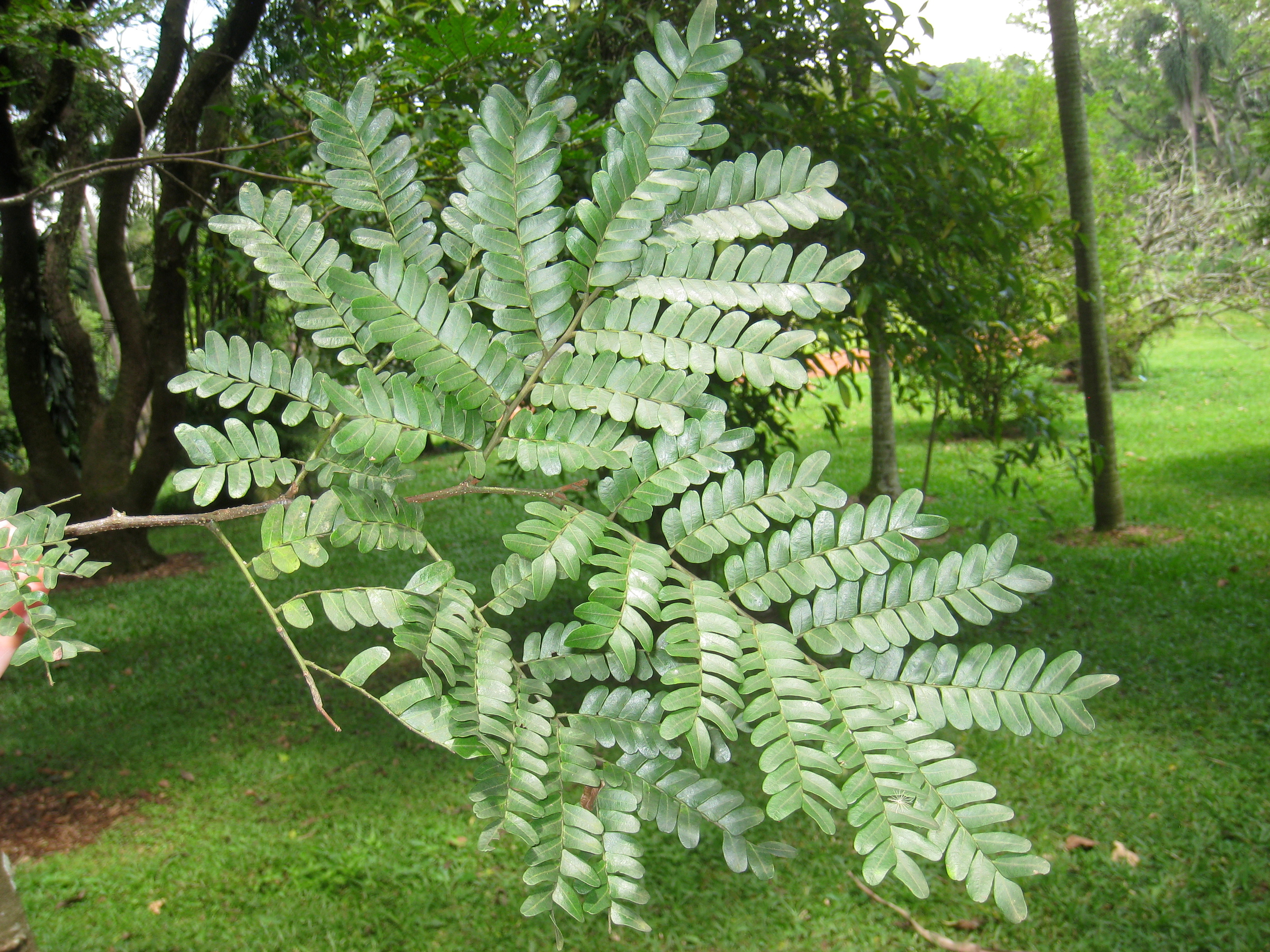 Caesalpinia echinata in the Jardim Botânico de São Paulo, São Paulo City, SP, Brazil.